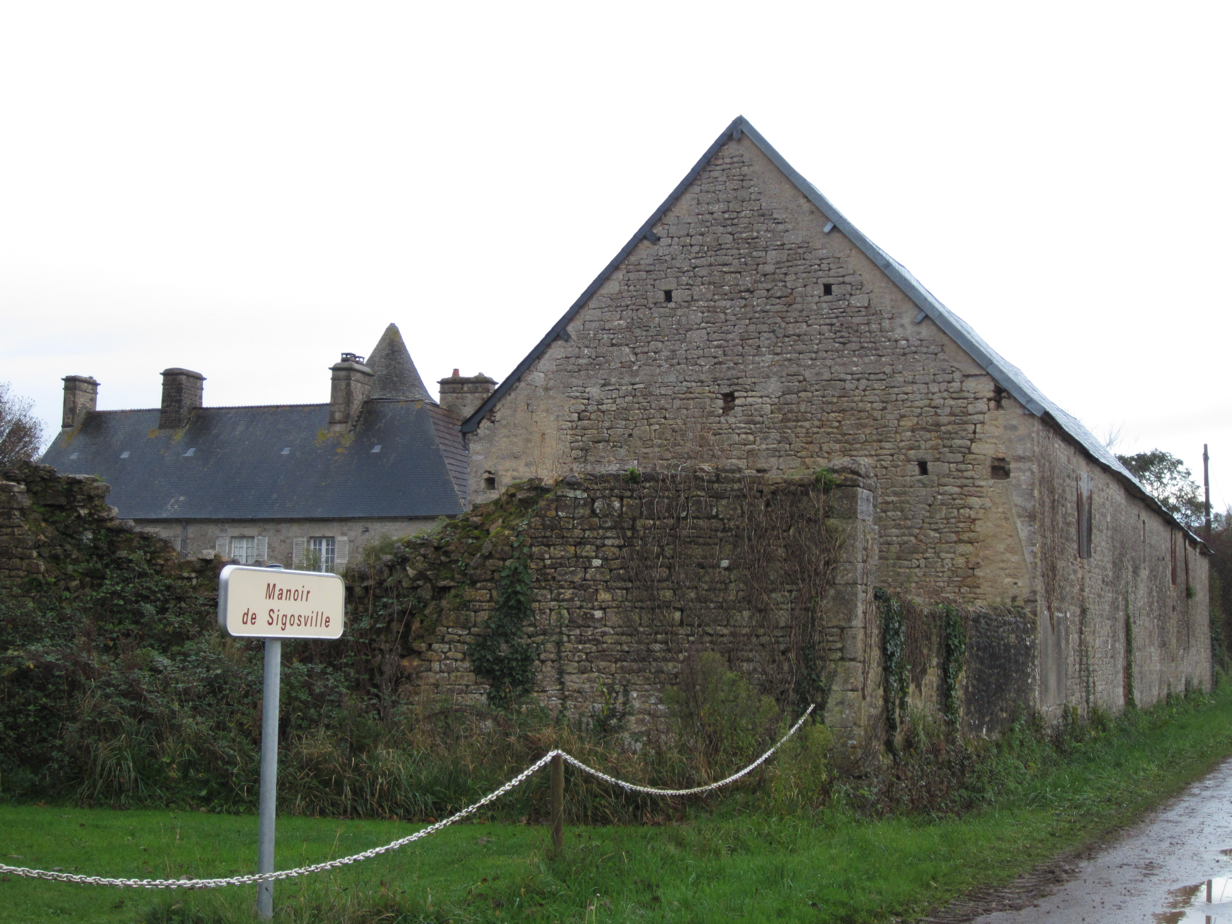 Manoir de Sigosville, Le Ham (Manche)